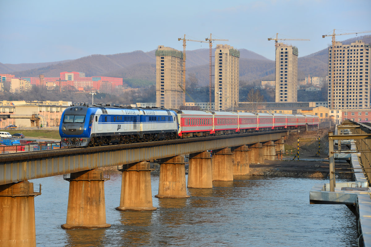 巡道工出品 photo by Xundaogong——客车k430通过梅集线k127浑江大桥